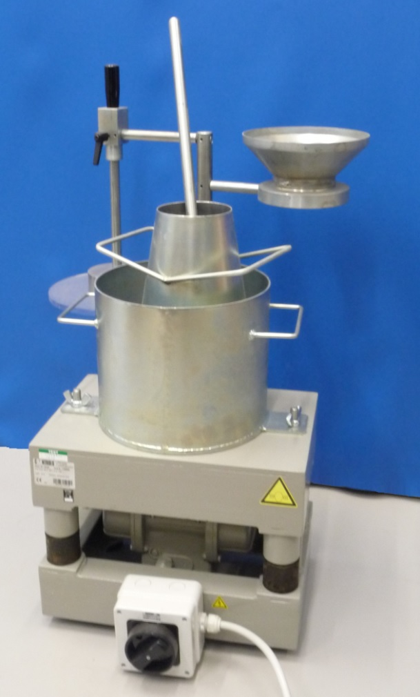 Zestaw przyrządów do badania konsystencji metodą Ve-be.